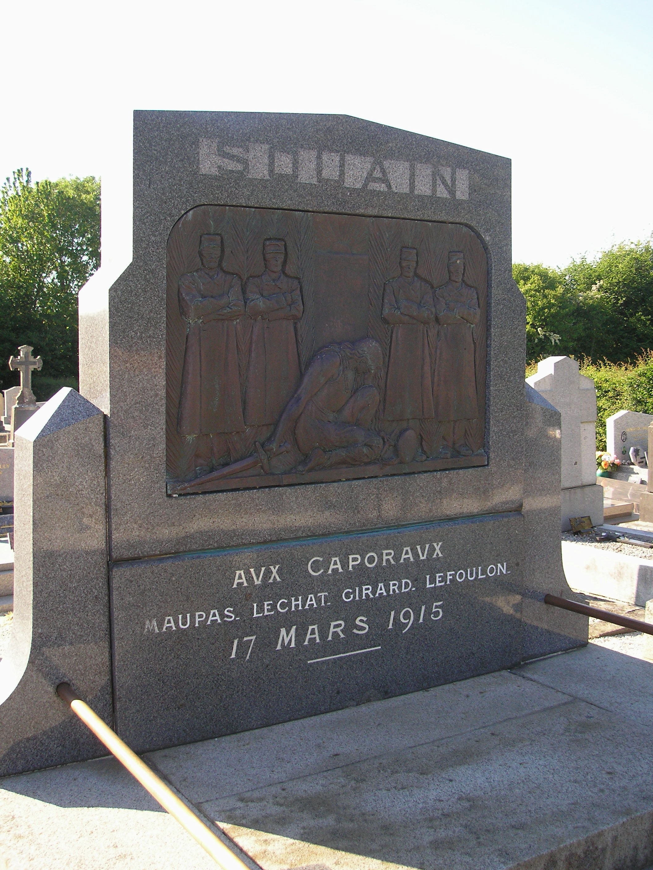 Sartilly (Normandie, France). Monument funéraire des caporaux de Souains, par Paul Moreau-Vauthier (1871-1936).